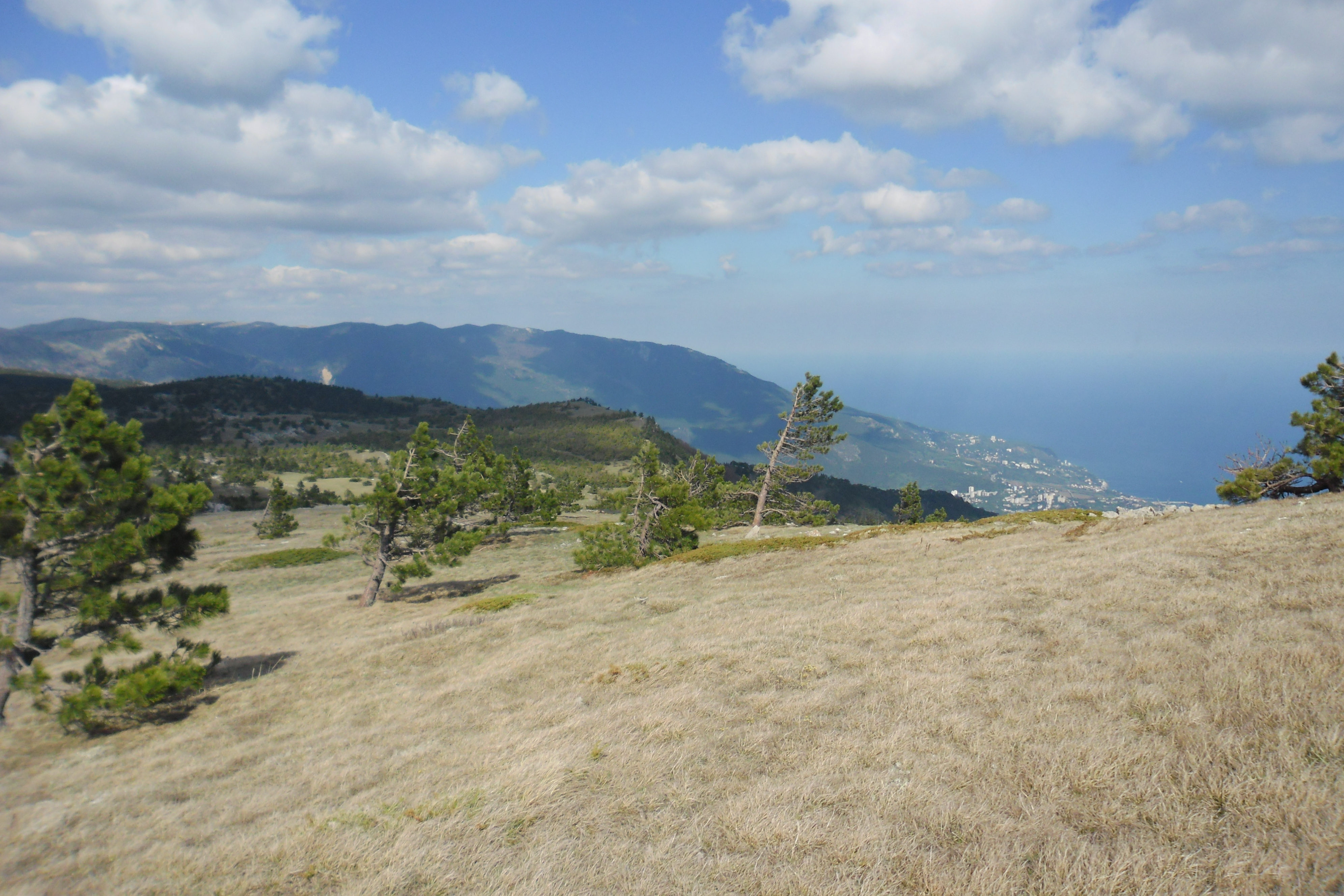 Фото